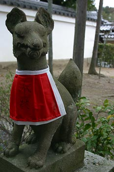 Kyōto Sōtan-inari (京都市上京区 宗旦稲荷)